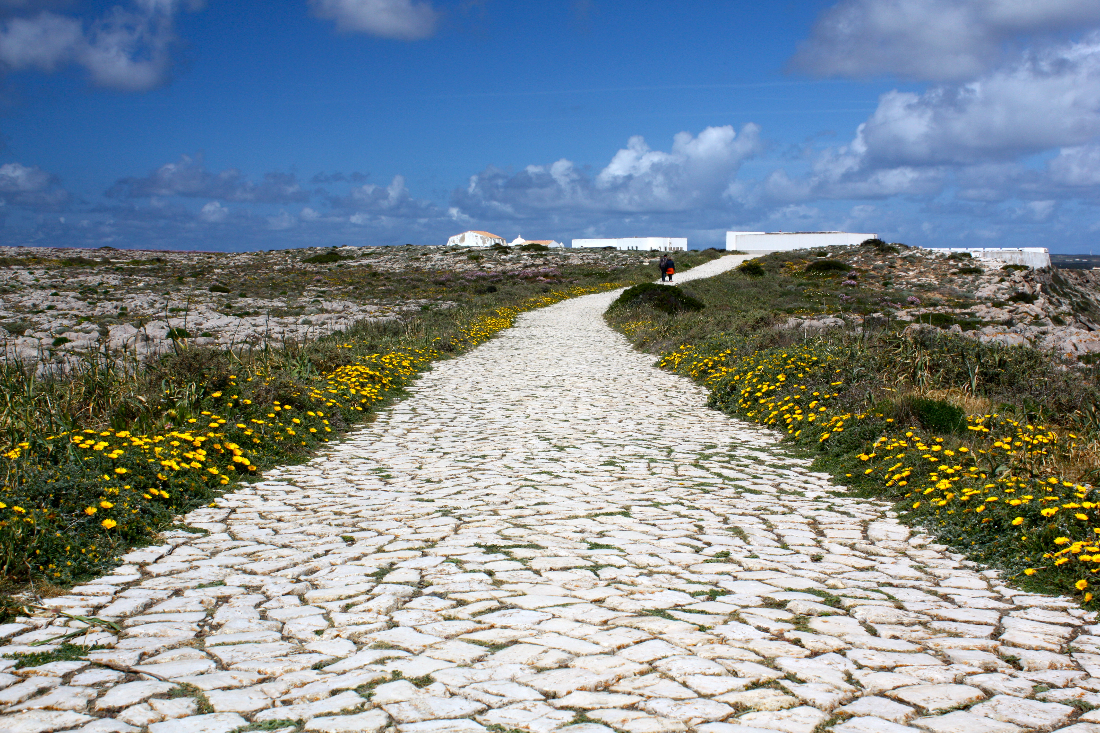 Sagres - 59